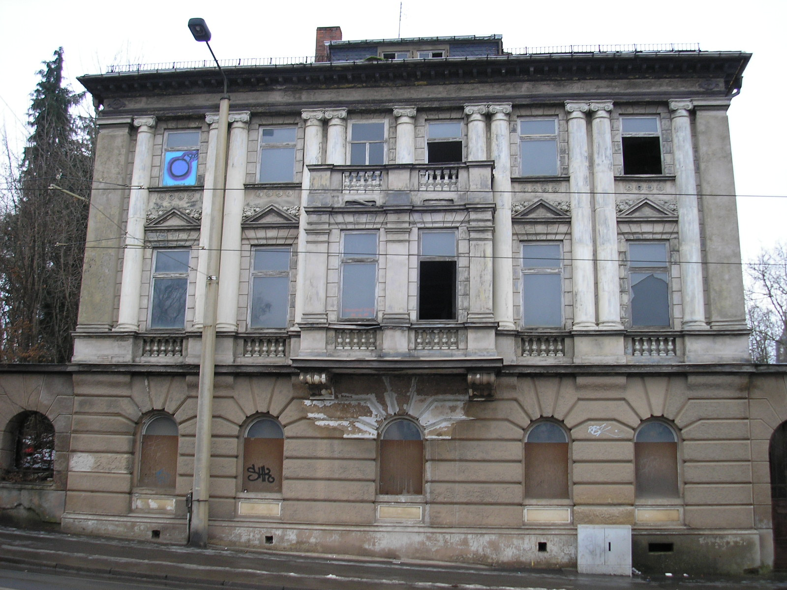 Eine (verfallene) Villa in der Friedrichstraße in Gotha (Thüringen).